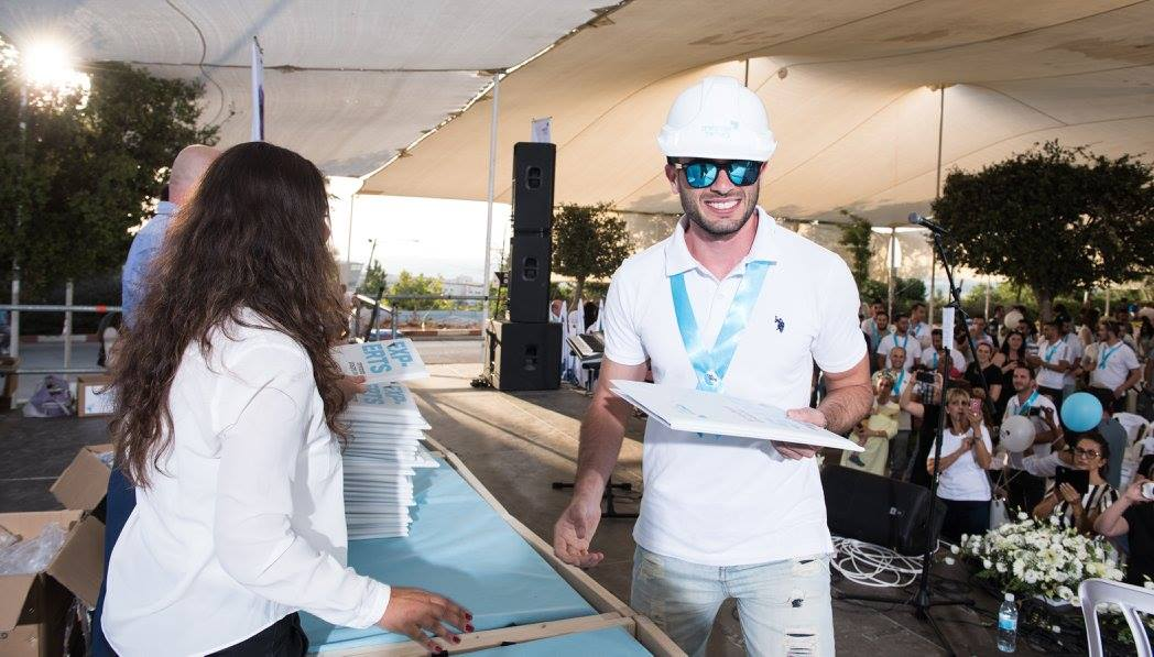 טקס הענקת דיפלומות